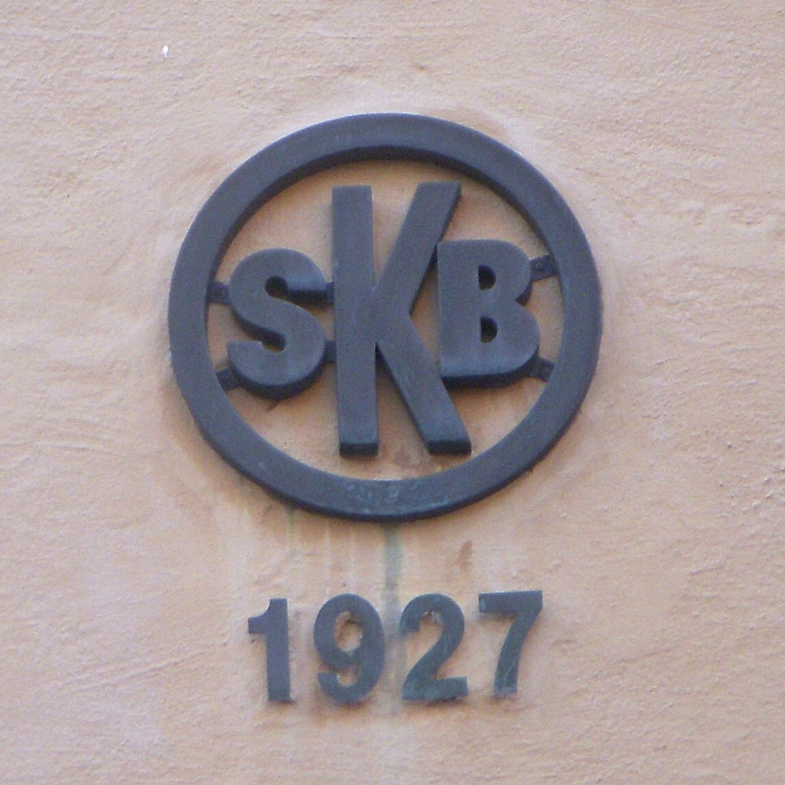 Blecktornsområdet på Södermalm i Stockholm, logo för "Stockholms Kooperativa Bostadsförening"